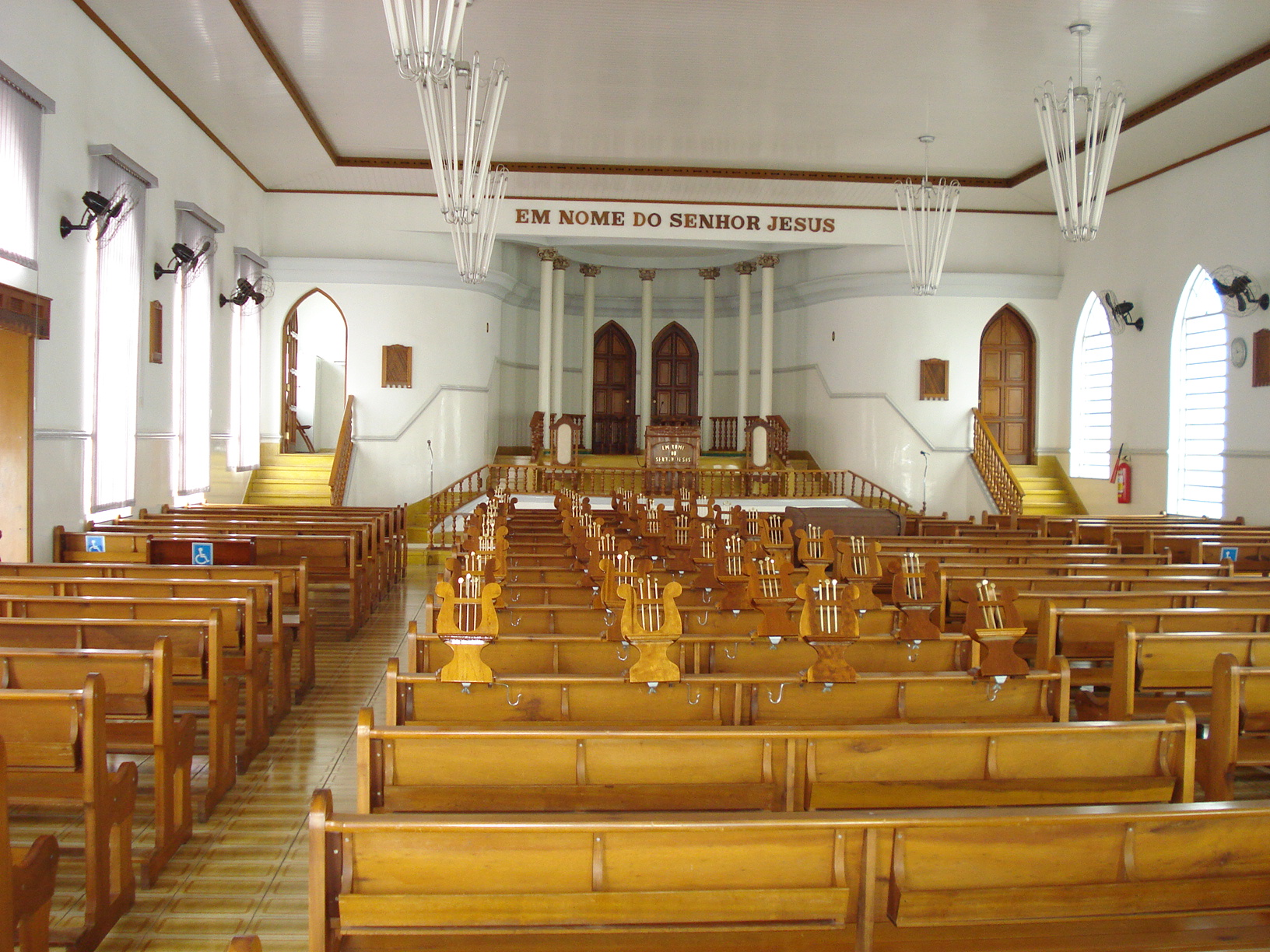 CCB Central - interno - Catanduva (clique na foto)